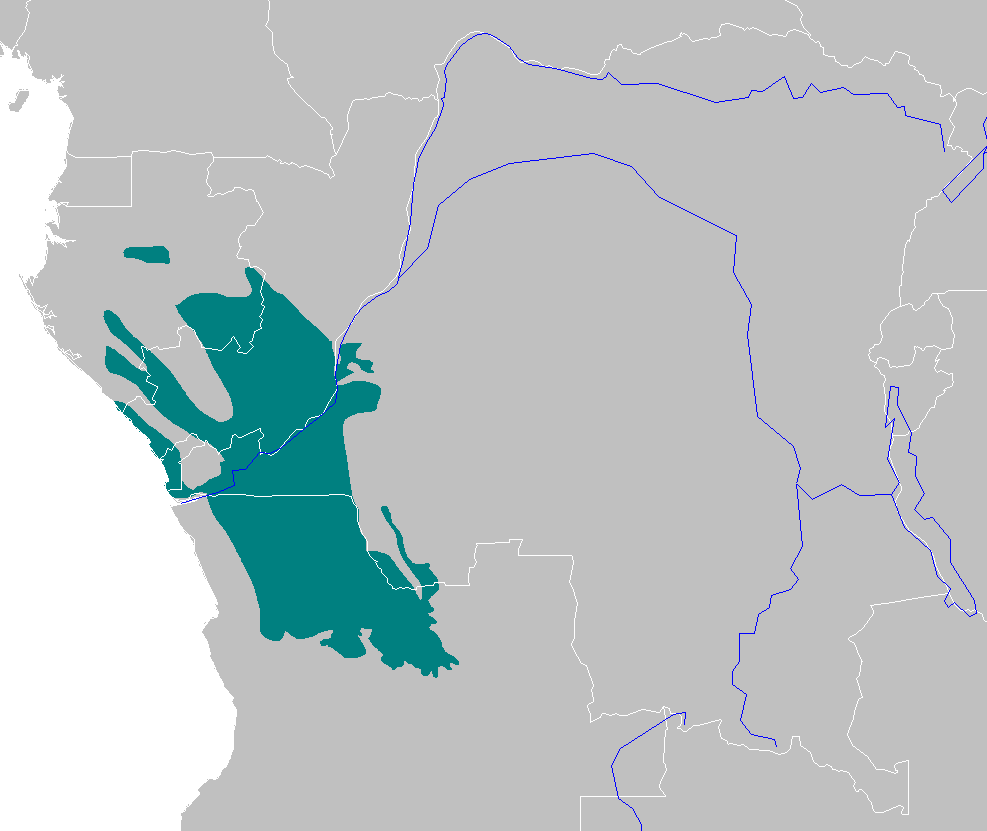 Western Congolian forest-savanna mosaic ecoregion map